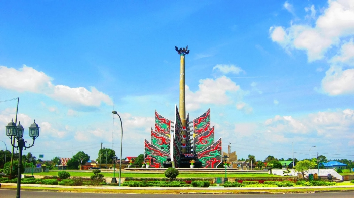 Bundaran Besar Kuala Kapuas